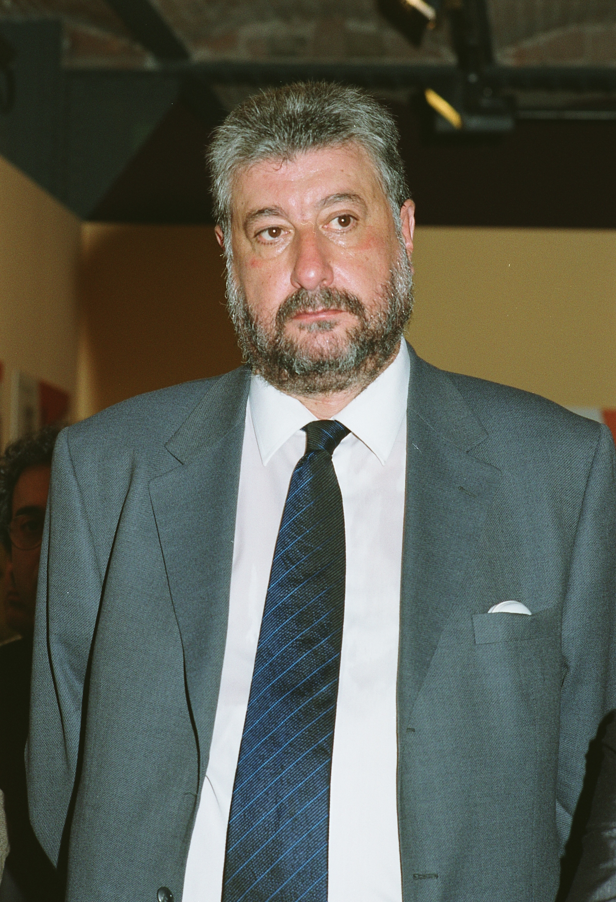 Fidalgo al MHC el 2001.